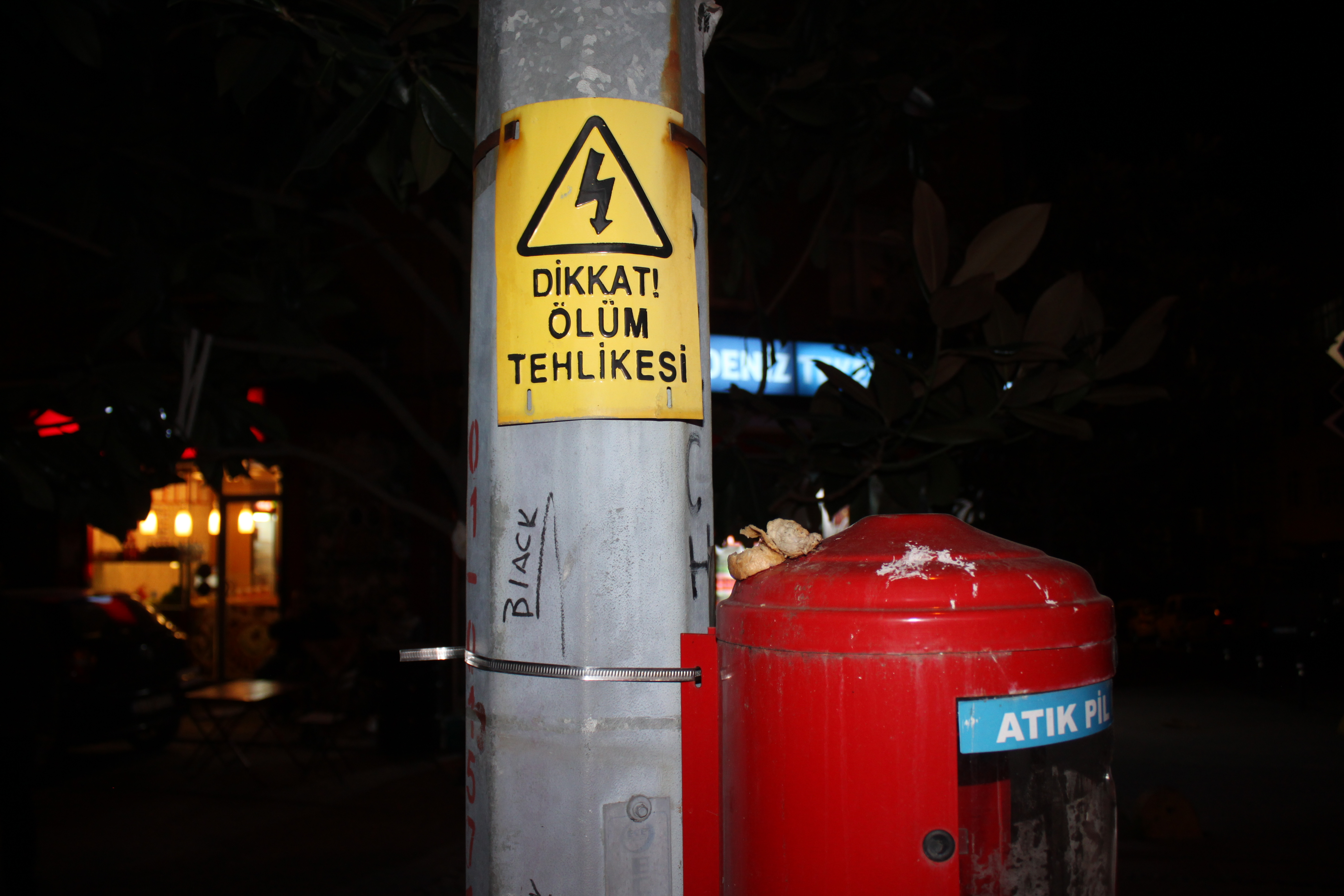 Elektrik direğinde "Dikkat Ölüm Tehlikesi" tabelası